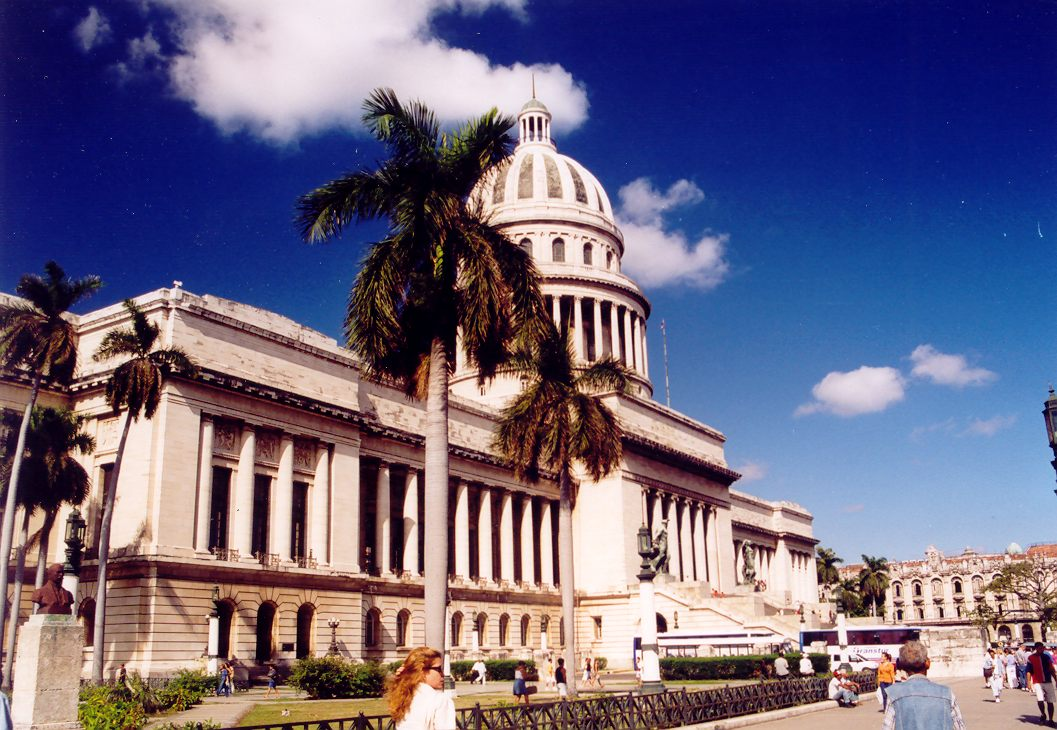 Capitolio de La Habana